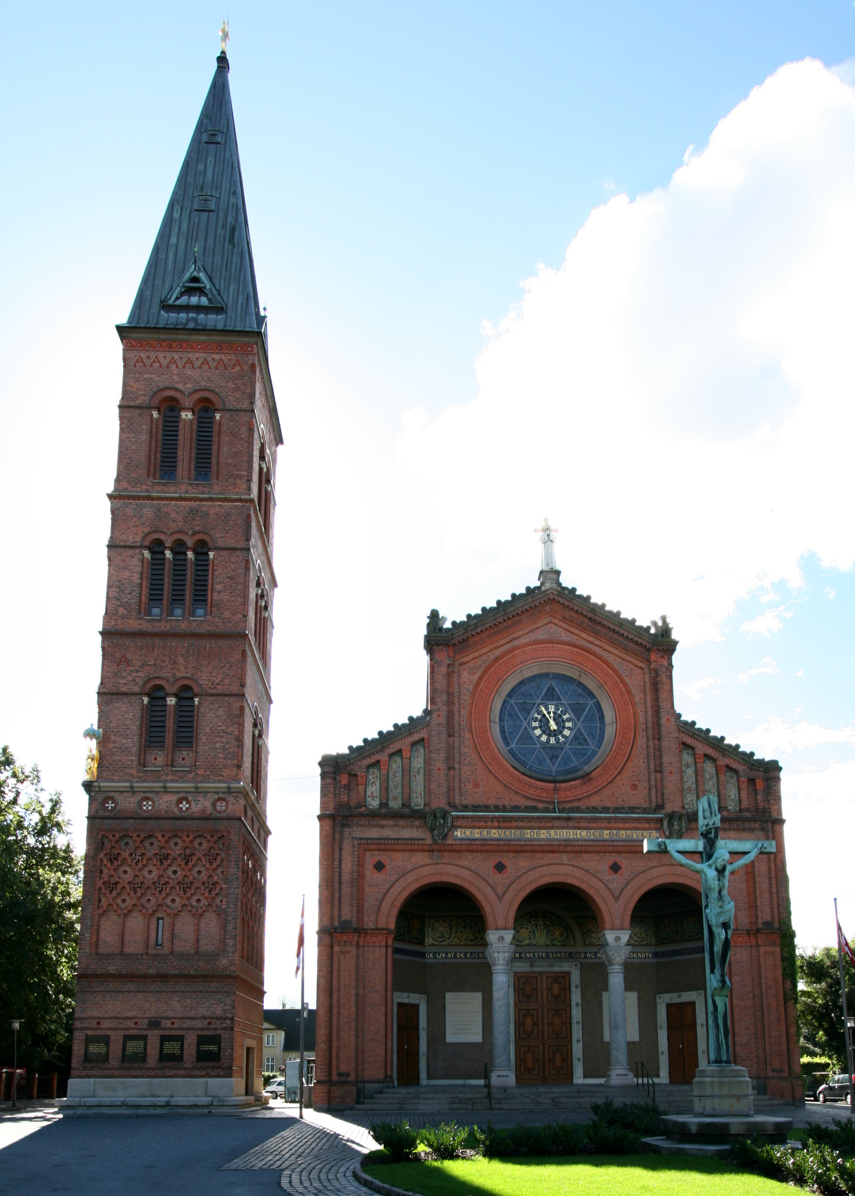 Jesuskirken, Valby, Copenhagen, Denmark Jesuskirken